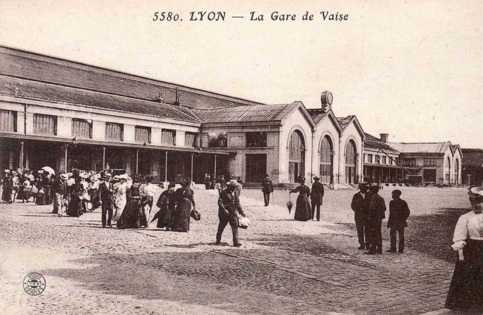 ancienne gare de Vaise à Lyon